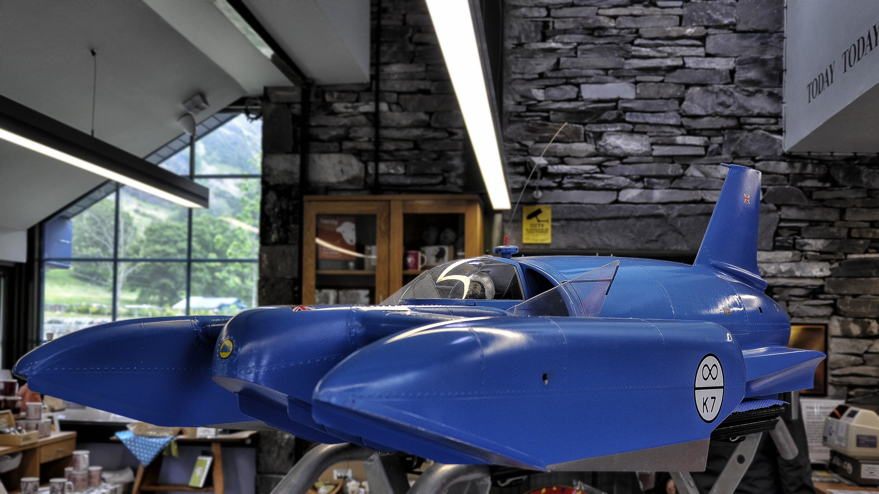 Een model van de Bluebird K7 in het Ruskin Museum, Coniston, Engeland